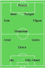 Distribución en cancha de los jugadores del Girona FC que ascendió a Segunda División del fútbol español en la temporada 2008